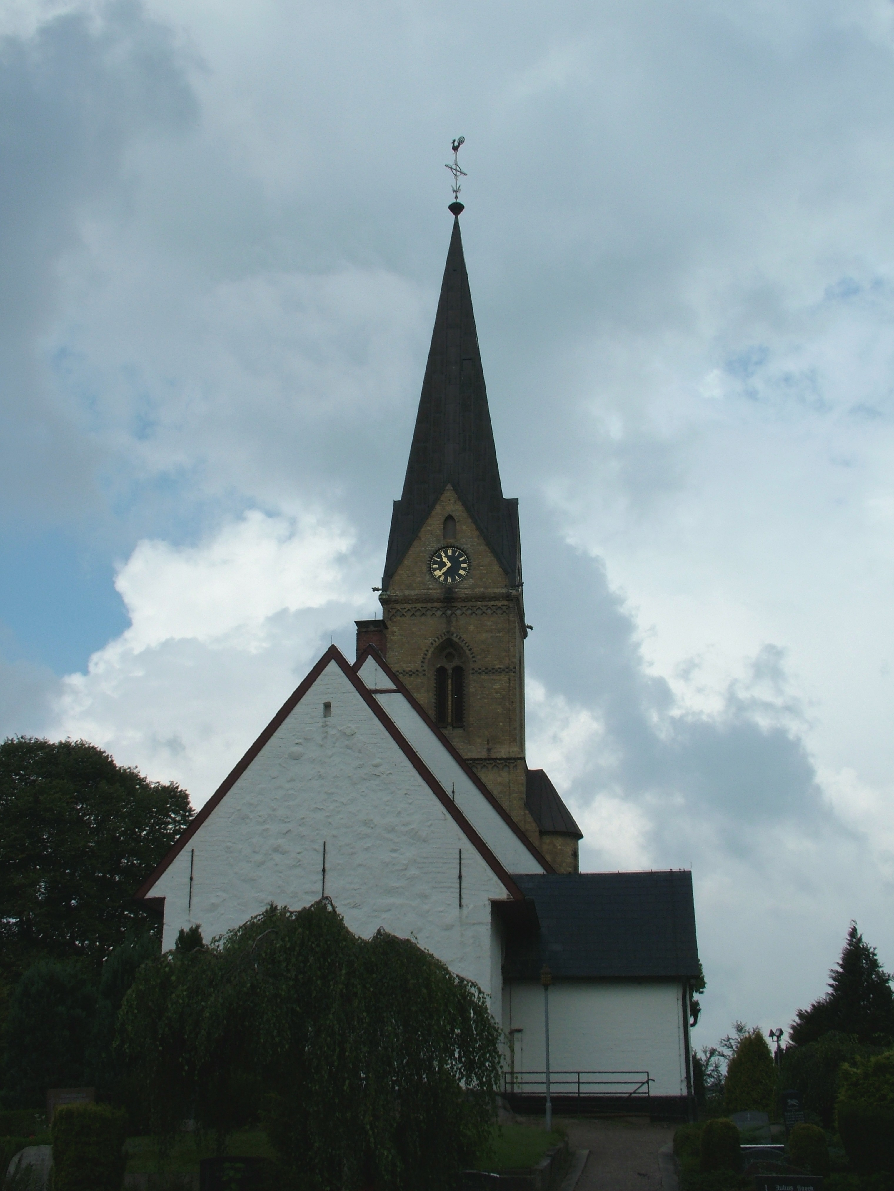 Süderbrarup, Schleswig-Holstein, ev.-luth. St. Jacobi-Kirche